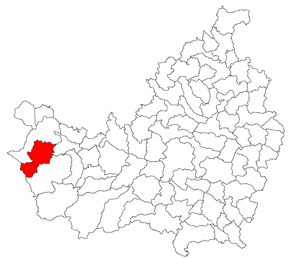 Categorie:Hărţi ale judeţului Cluj